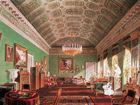 Картина художника Й. Сотира "Салон Фикельмонов во дворце Салтыкова с изображением 10-летней Елизалекс. Петербург". Акварель. Репродукция. Хранится в краевом музее в городе Теплице.